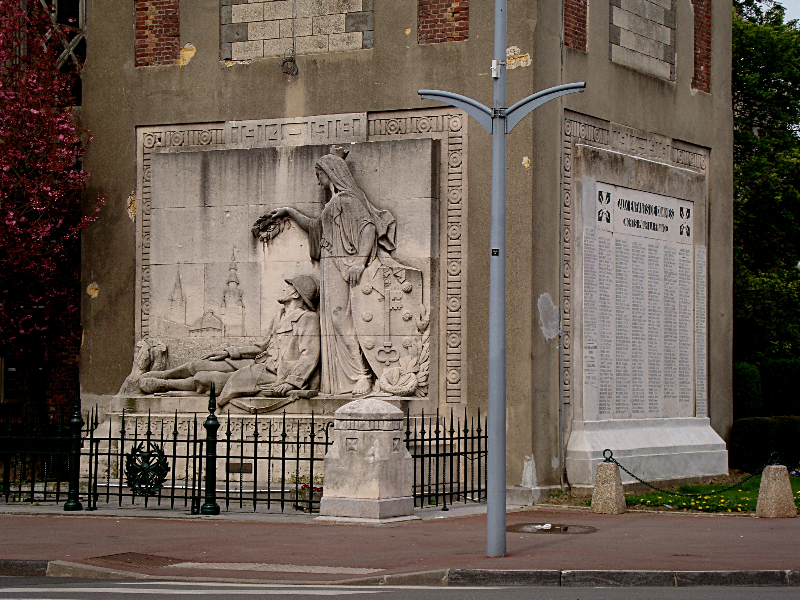 Le monument aux morts de Comines (Nord).